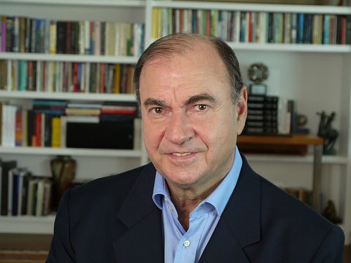 Foto do Cesar Maia